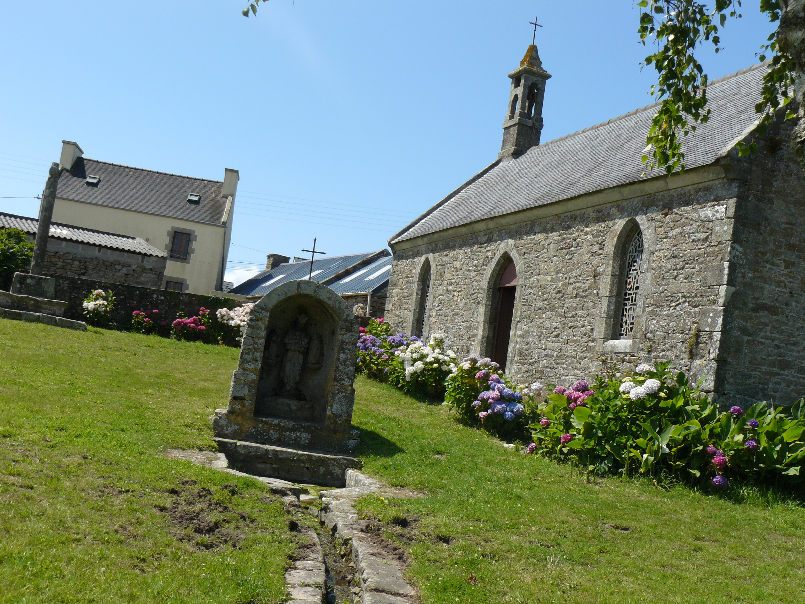 La chapelle Saint-Eloi de Kerlanou, reconstruite vers 1880, a été le siège de la dévotion à Saint-Eloi avec le pardon des chevaux le 24 juin. Elle comprend un lavoir et des fontaines.